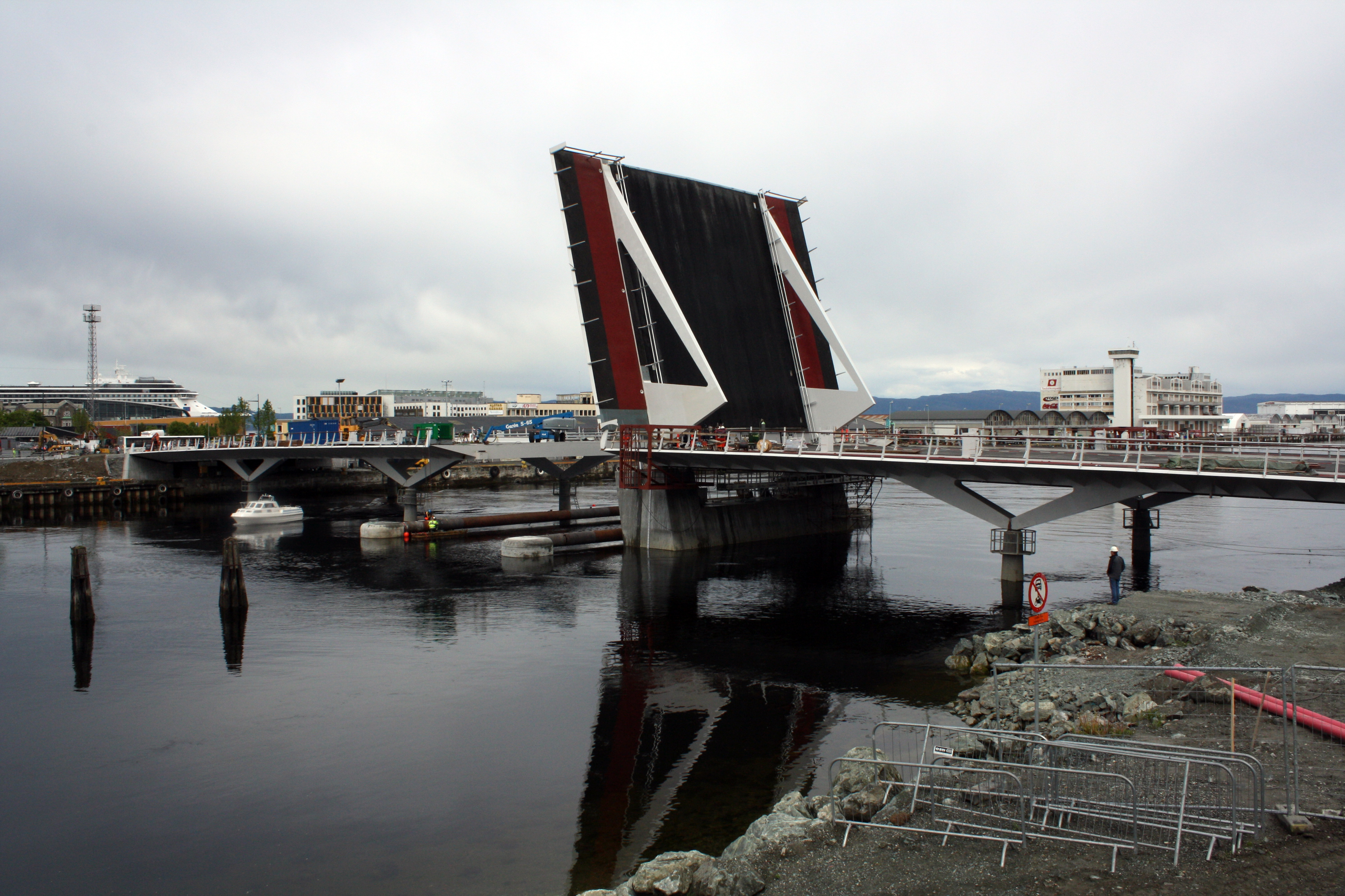 Pirbrua: Test av bruåpning